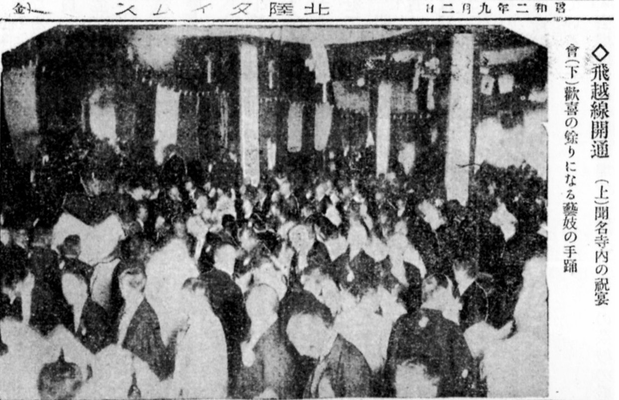 飛越線富山駅 - 越中八尾駅の開業を祝する八尾の人々